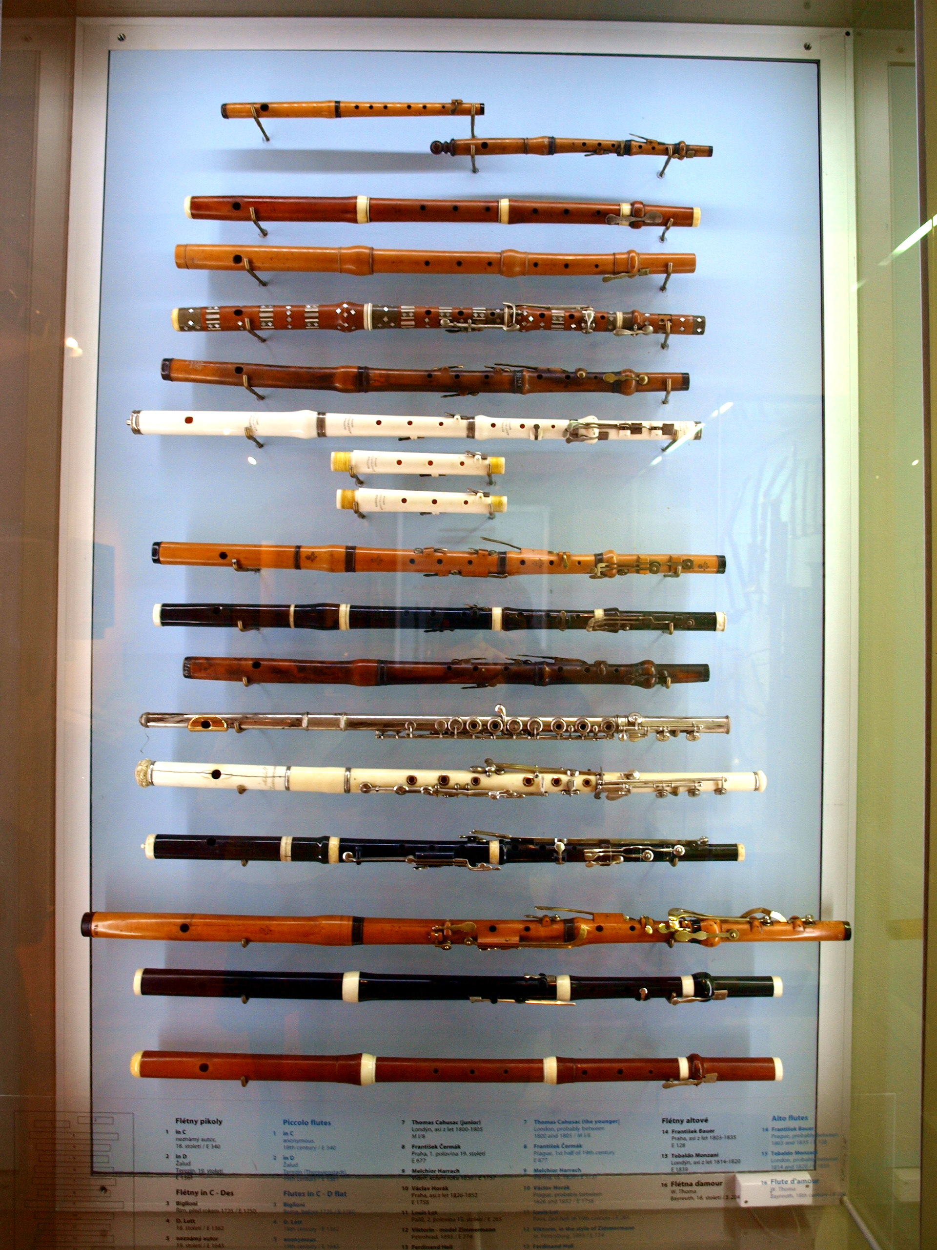 Aerofony, České muzeum hudby